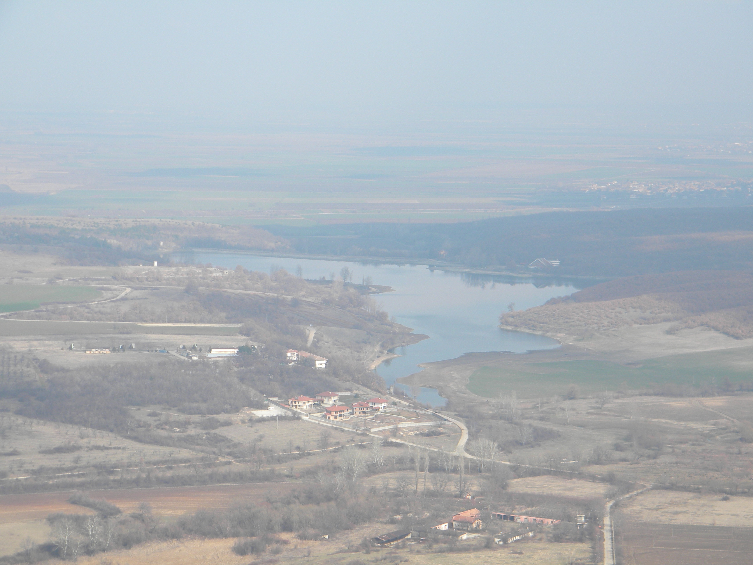 язовир 40-те извора